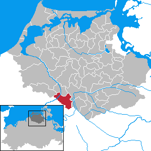 Lindholz in Mecklenburg-Vorpommern - District Nordvorpommern